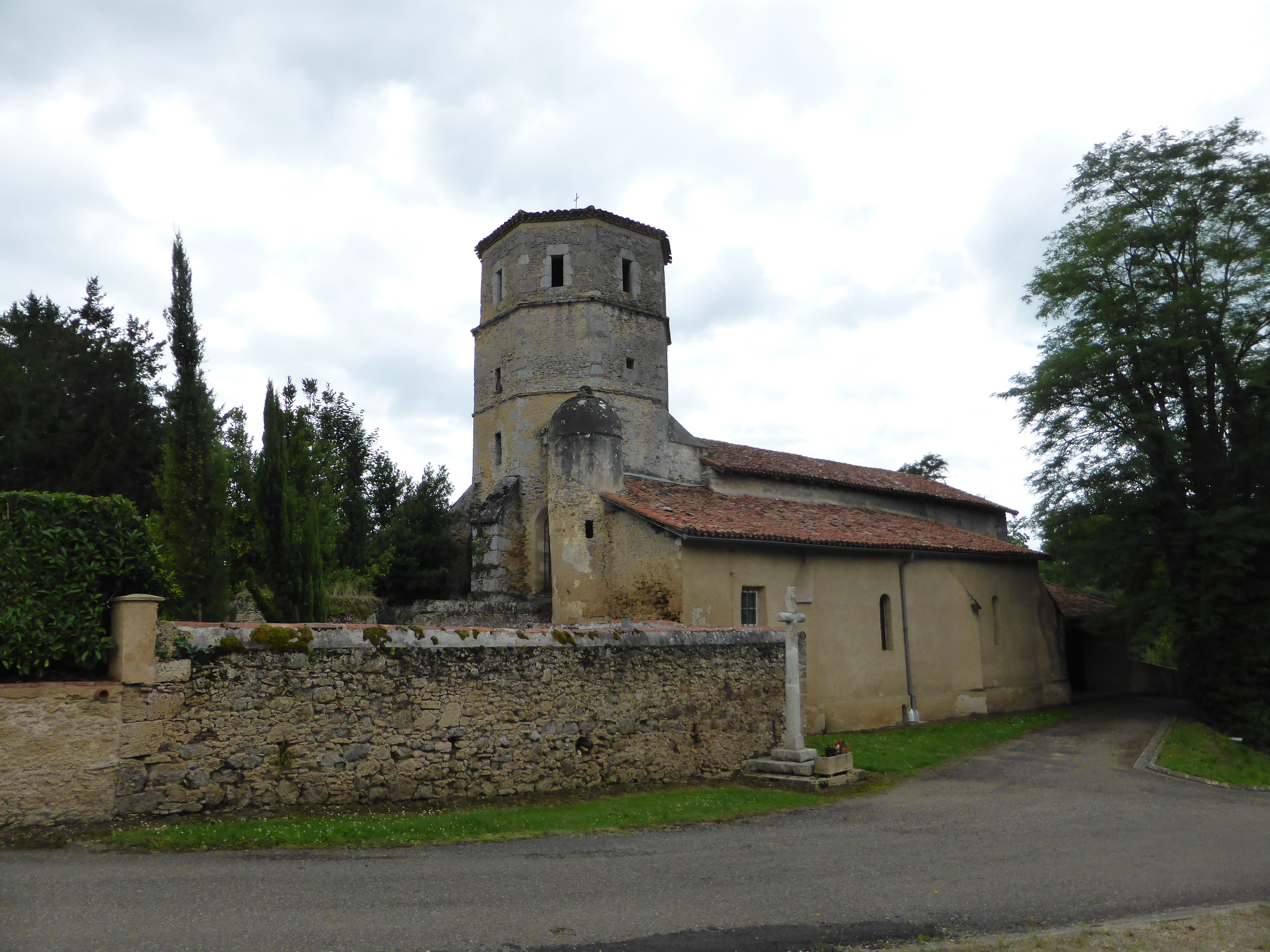 Église de Mauléon d'Armagnac, dans le Gers.